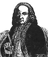 Эухенио Херардо Лобо